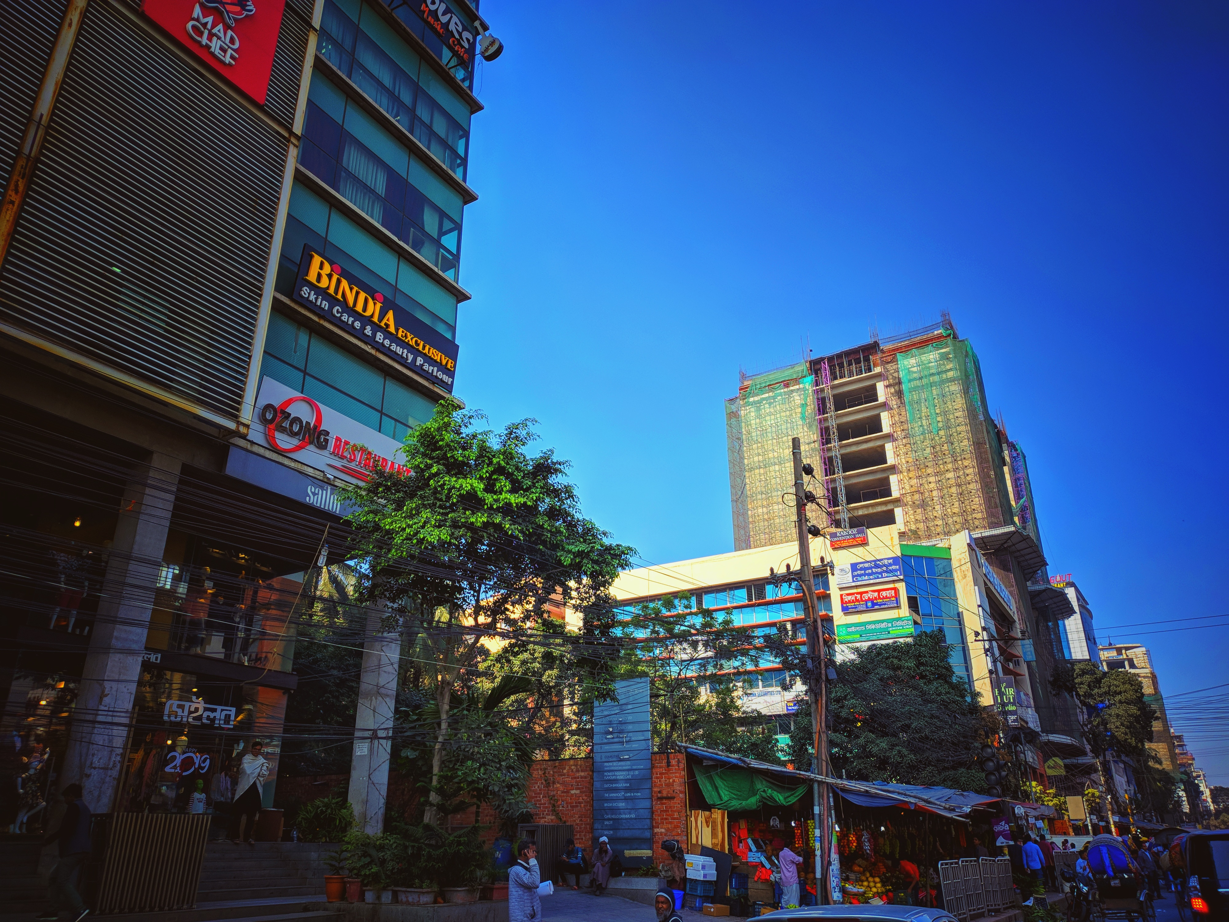 ধানমন্ডি